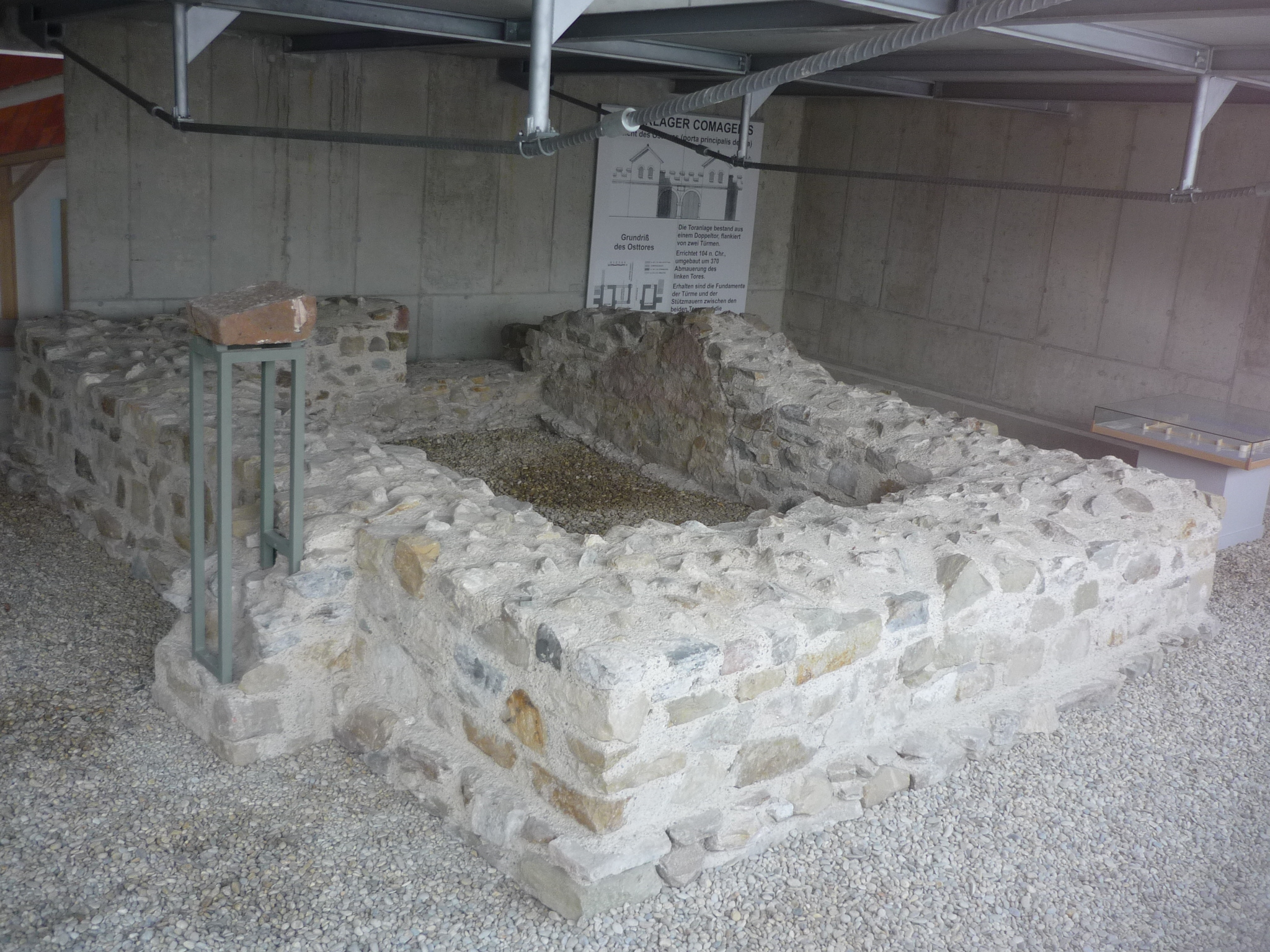 Porta principalis dextra, Kastell Comagena, Tulln